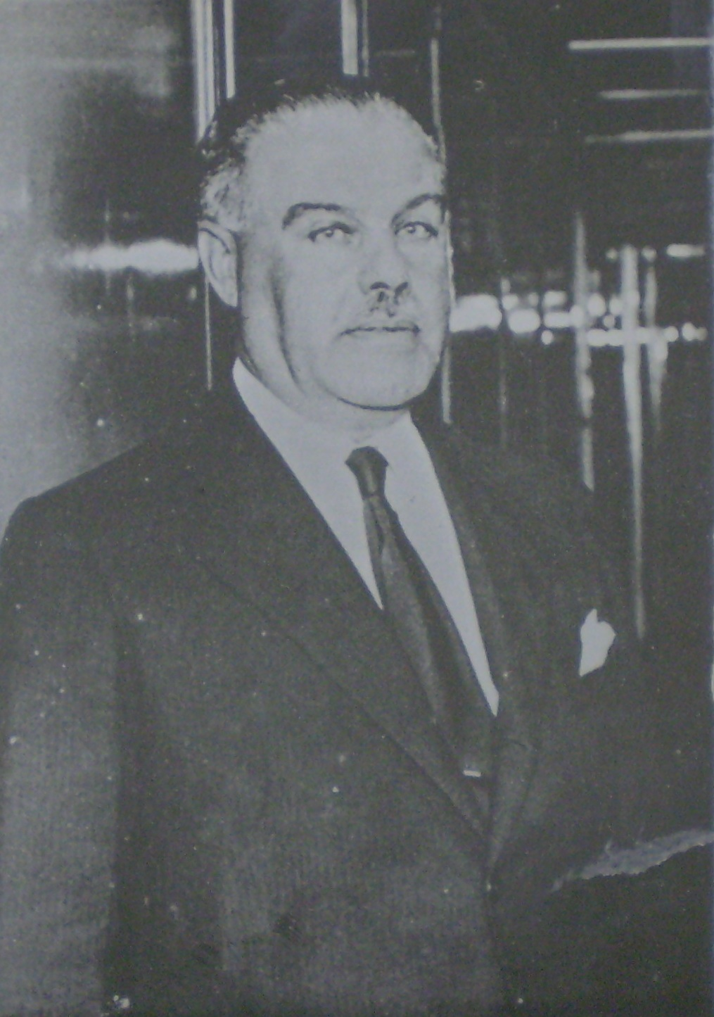 Conde de Guadalhorce. Constructor de la Línea C de subterráneos de Buenos Aires